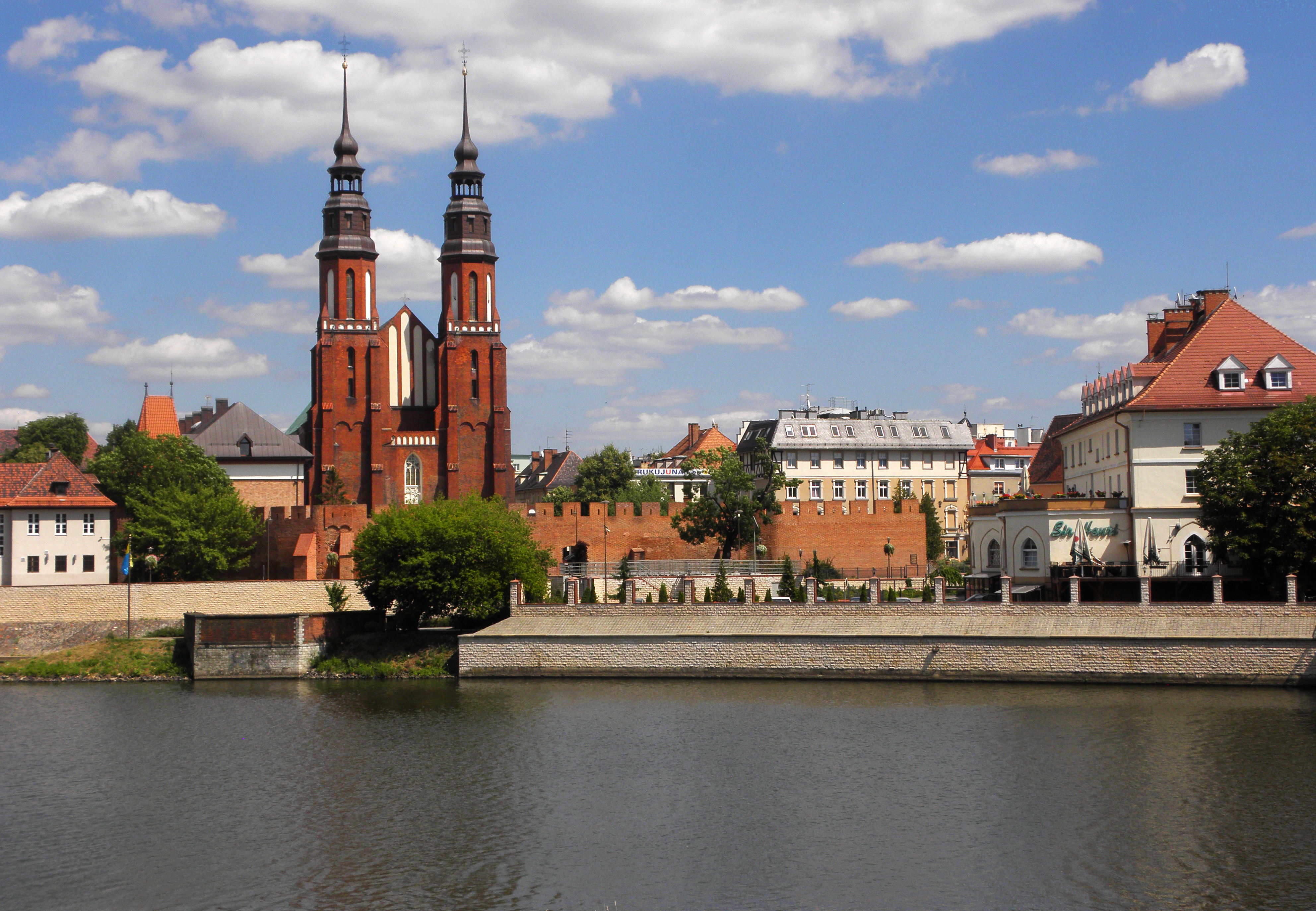 Opole, kościół katedralny p.w. Św. Krzyża, XV, 1889